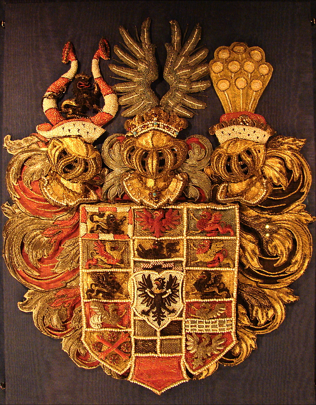 Dronning Anne Cathrine af Danmark og Norges våben som brandenburgsk prinsesse. Fra hendes rejseseng, Rosenborg slot, København